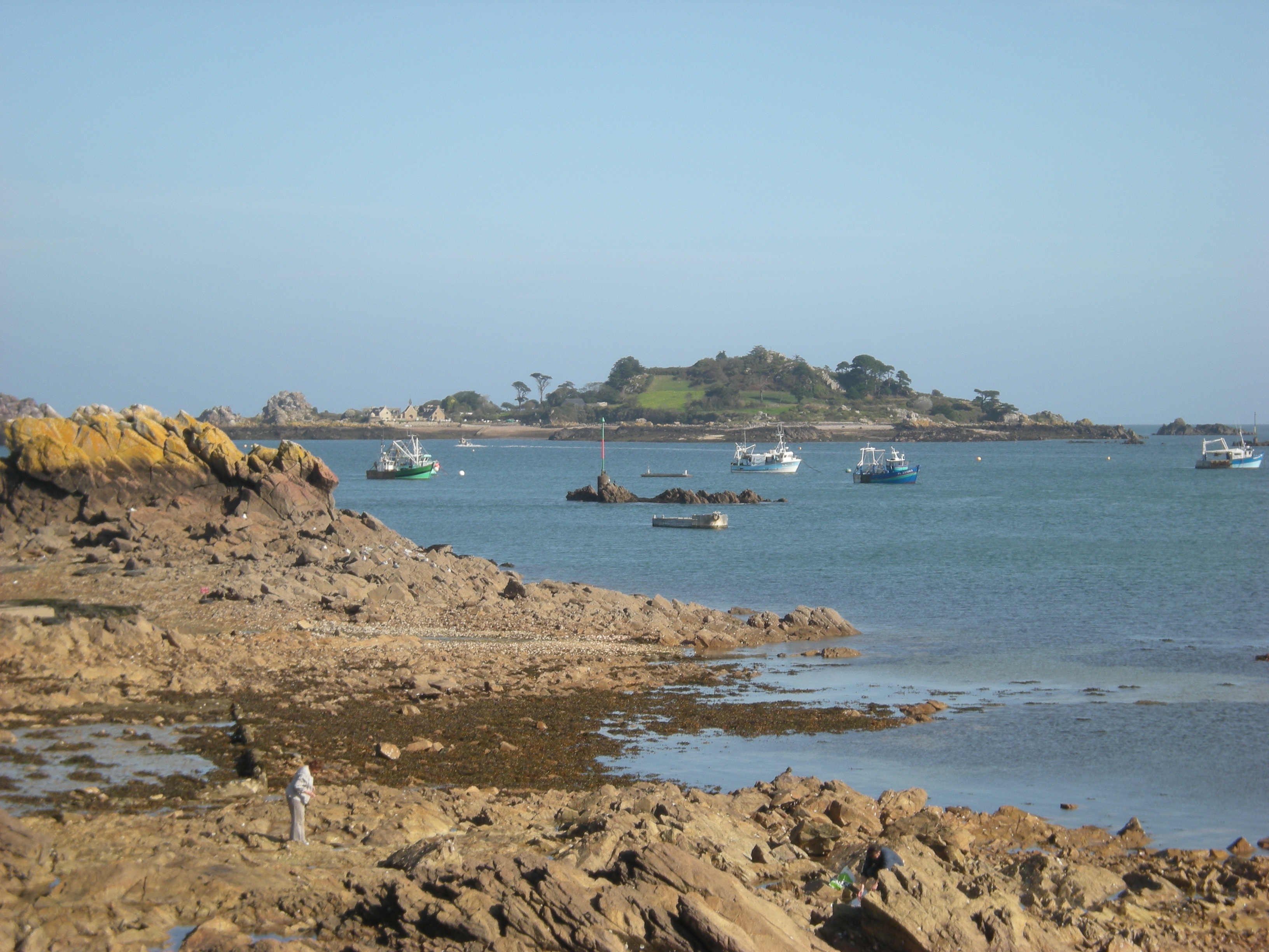 Vues de Ploubazlanec, Bretagne, France. L'île Saint-Riom vue depuis Pors-Even. Baie de Launay.